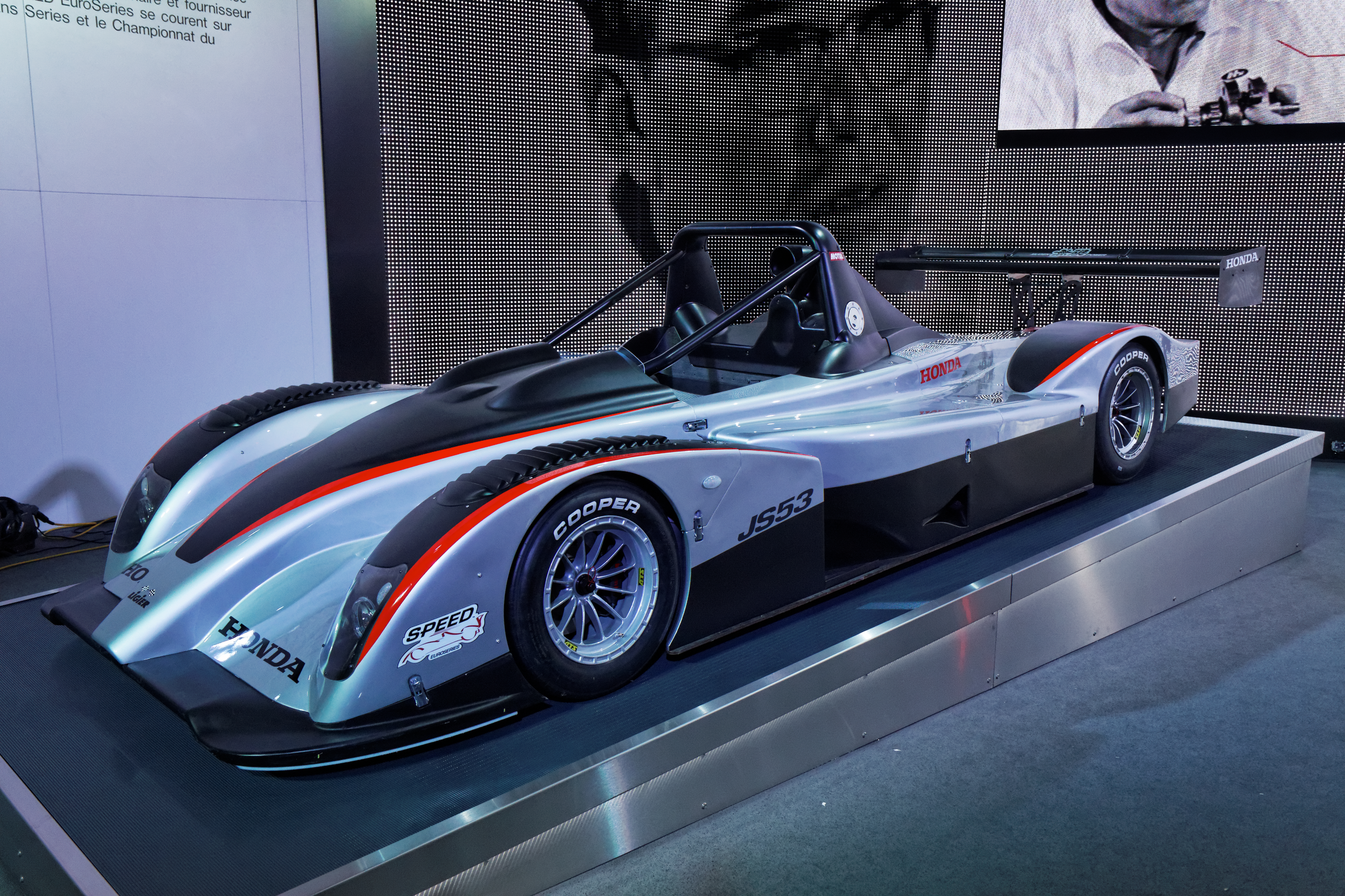 une Ligier-Martini JS53 présentée lors du Mondial de l'automobile de Paris 2012.